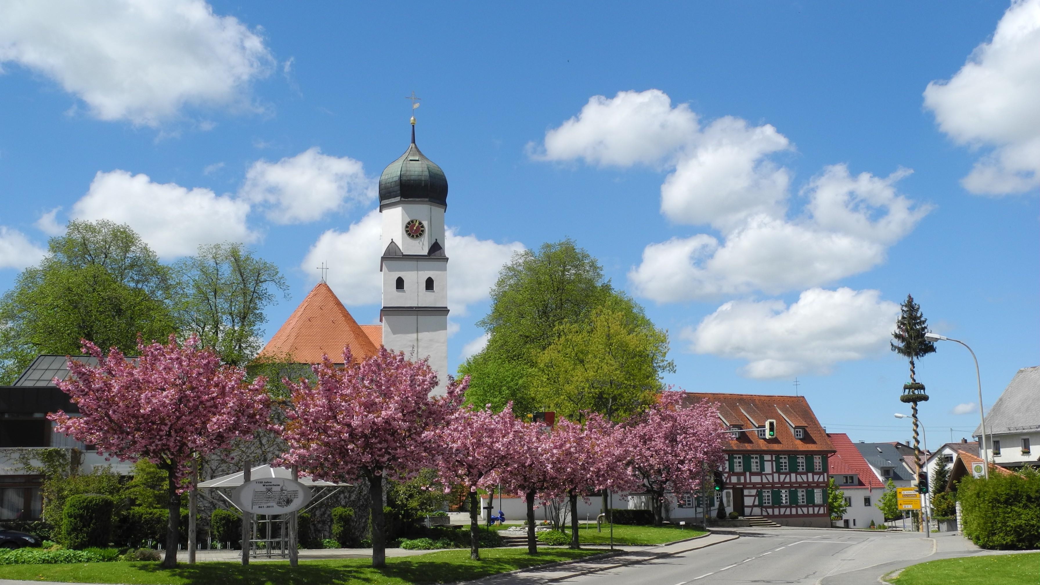 Westerheim - Kirche, Fachwerkhaus und Maibaum